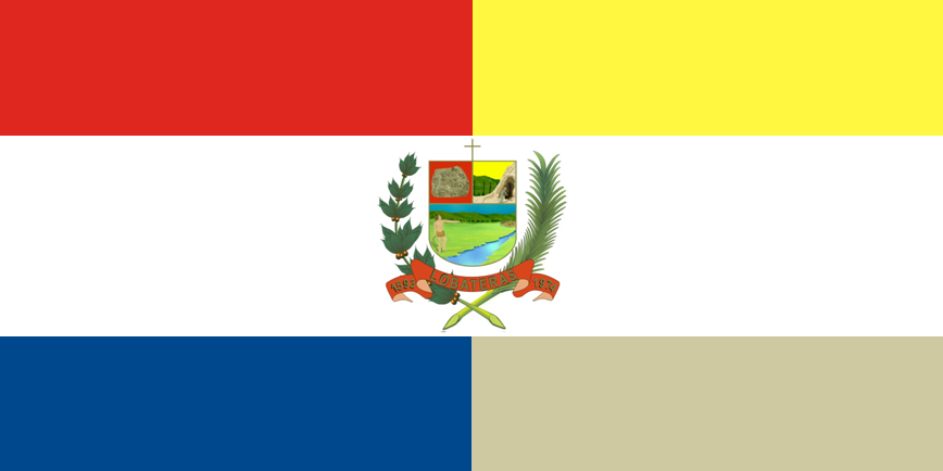 Bandera del municipio Lobatera, estado Táchira, Venezuela